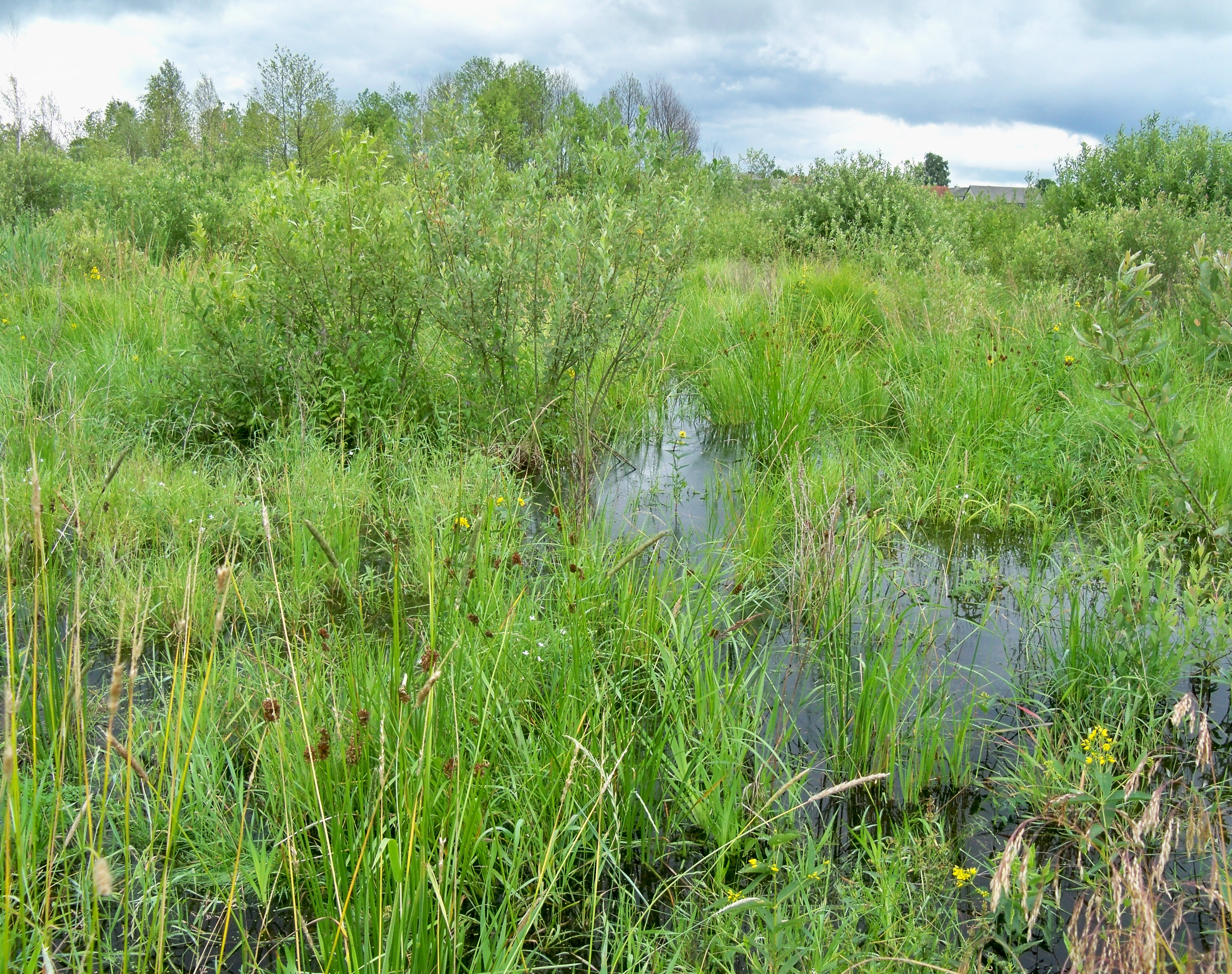 Zbiornik astatyczny w Dąbrowach Pierwszych k. Myszyńca